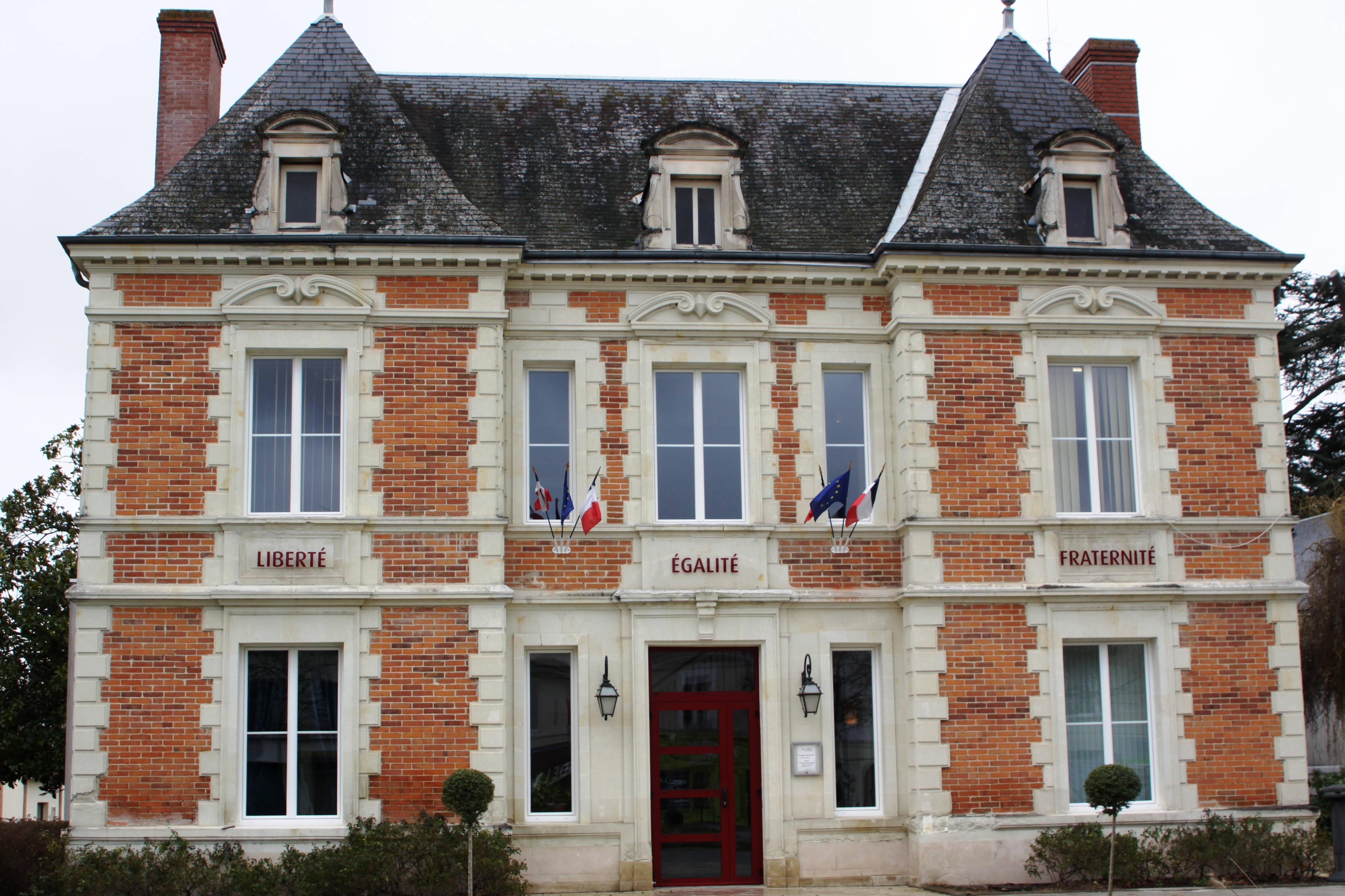 Maison communale de Dangé-Saint-Romain